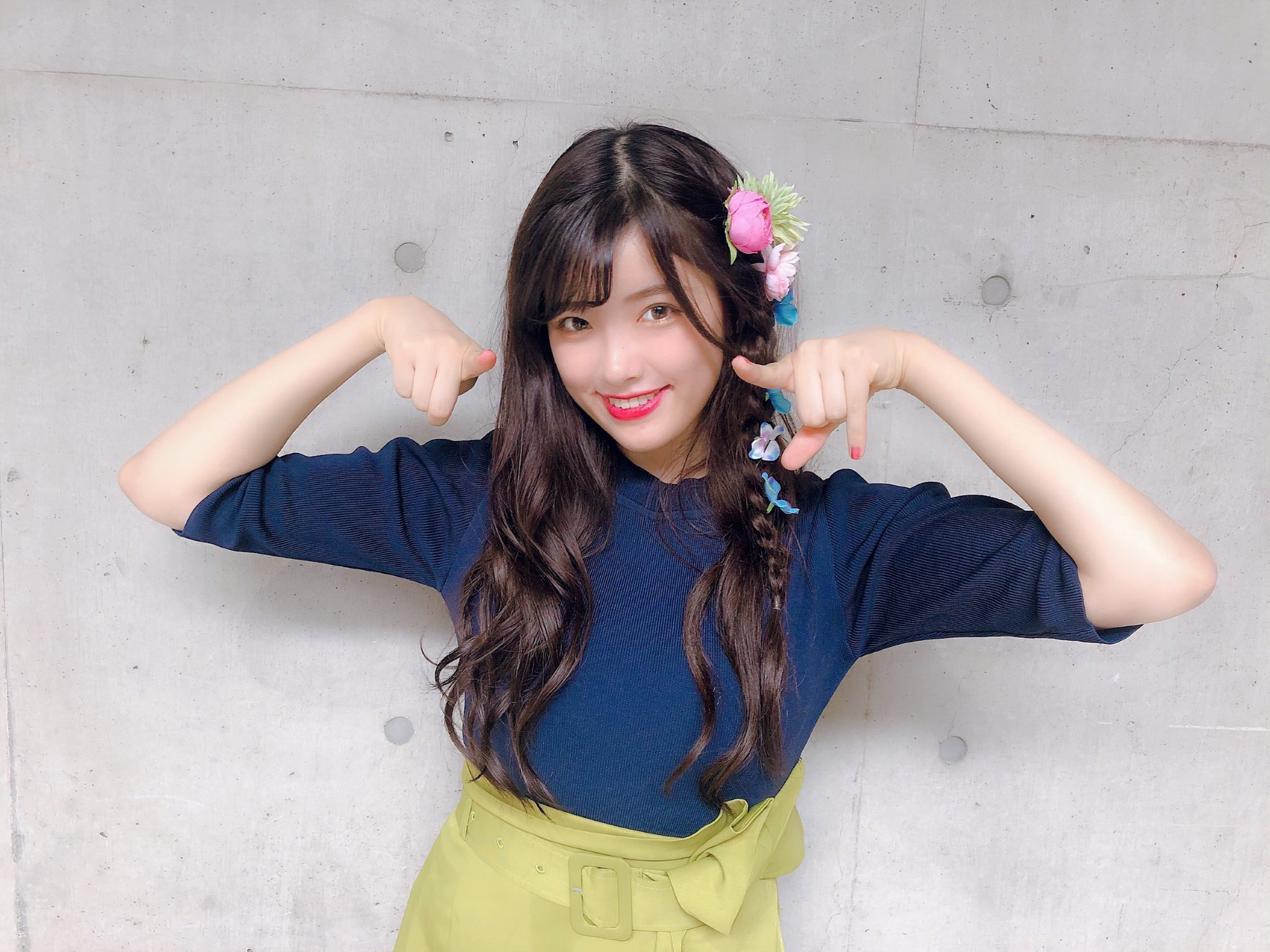 プロフィール